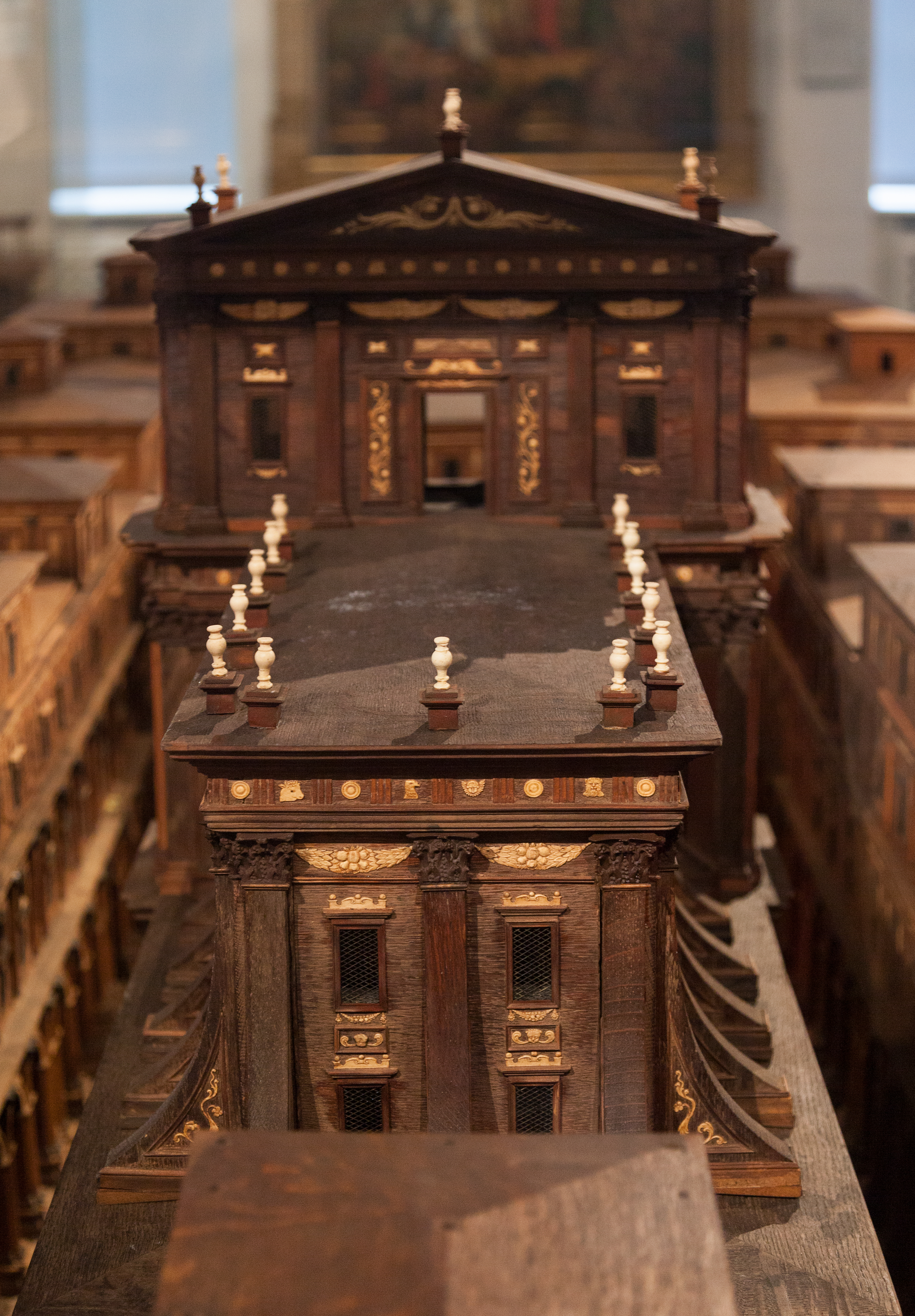 Detailaufnahme des Hamburger Modells des Salomonischen Tempels aus dem Museum für Hamburgische Geschichte.